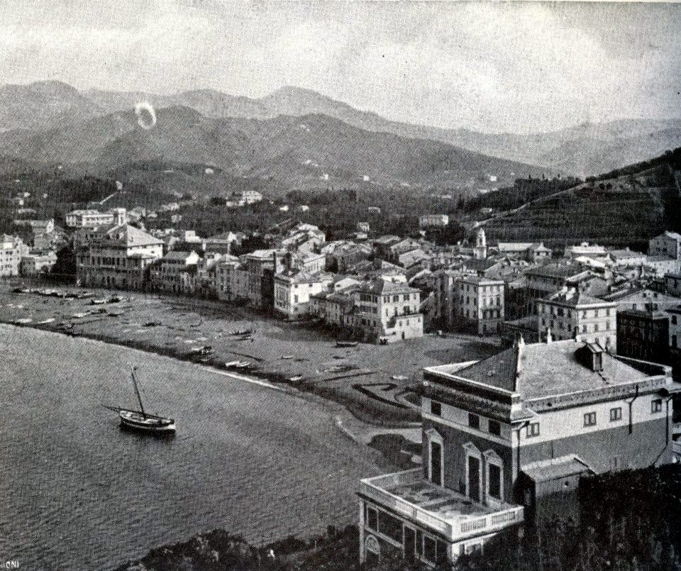 Panorama del litorale di Sestri Levante agli inizi del XX secolo